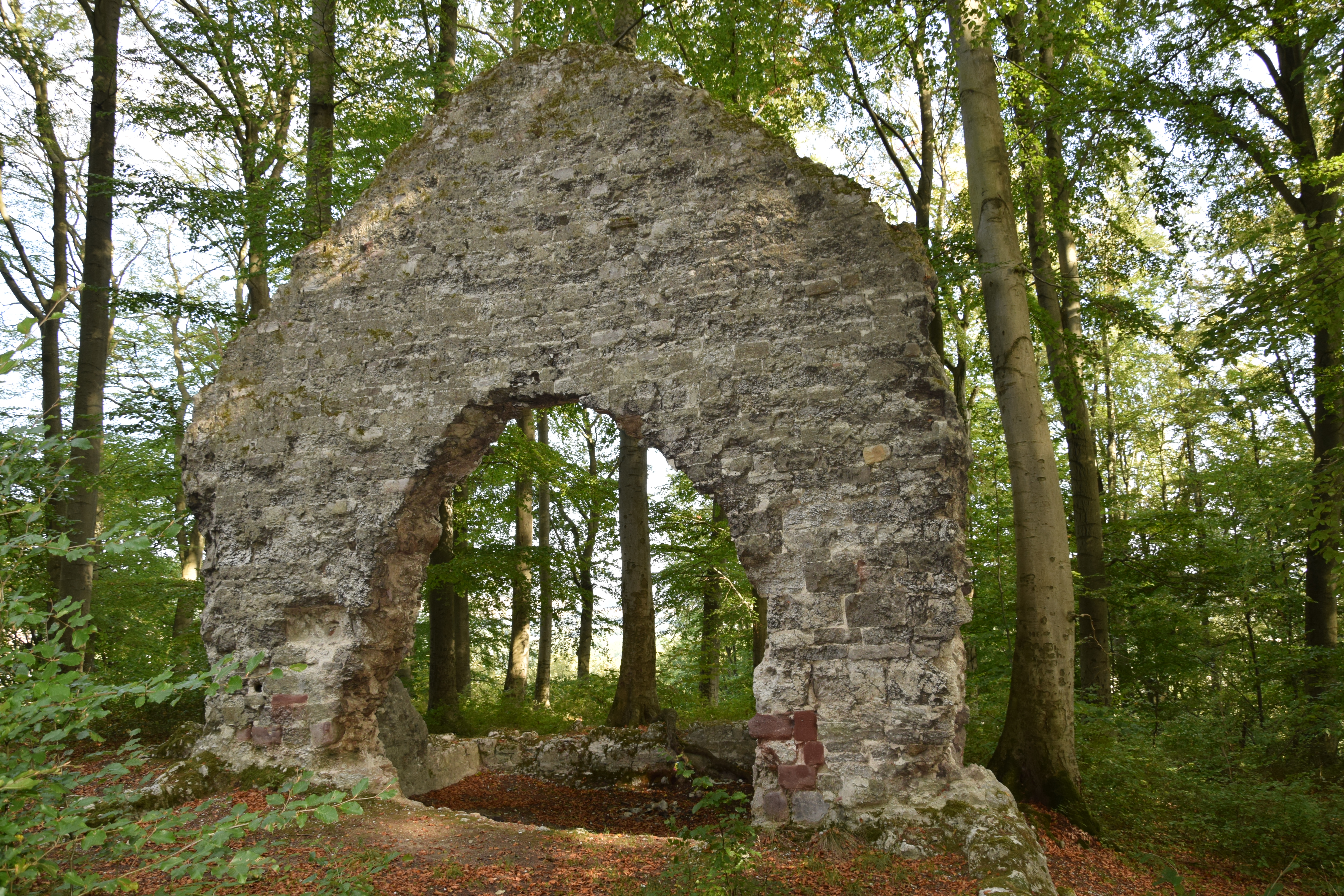 Die Grasburg bei Rottleberode - Giebelwand